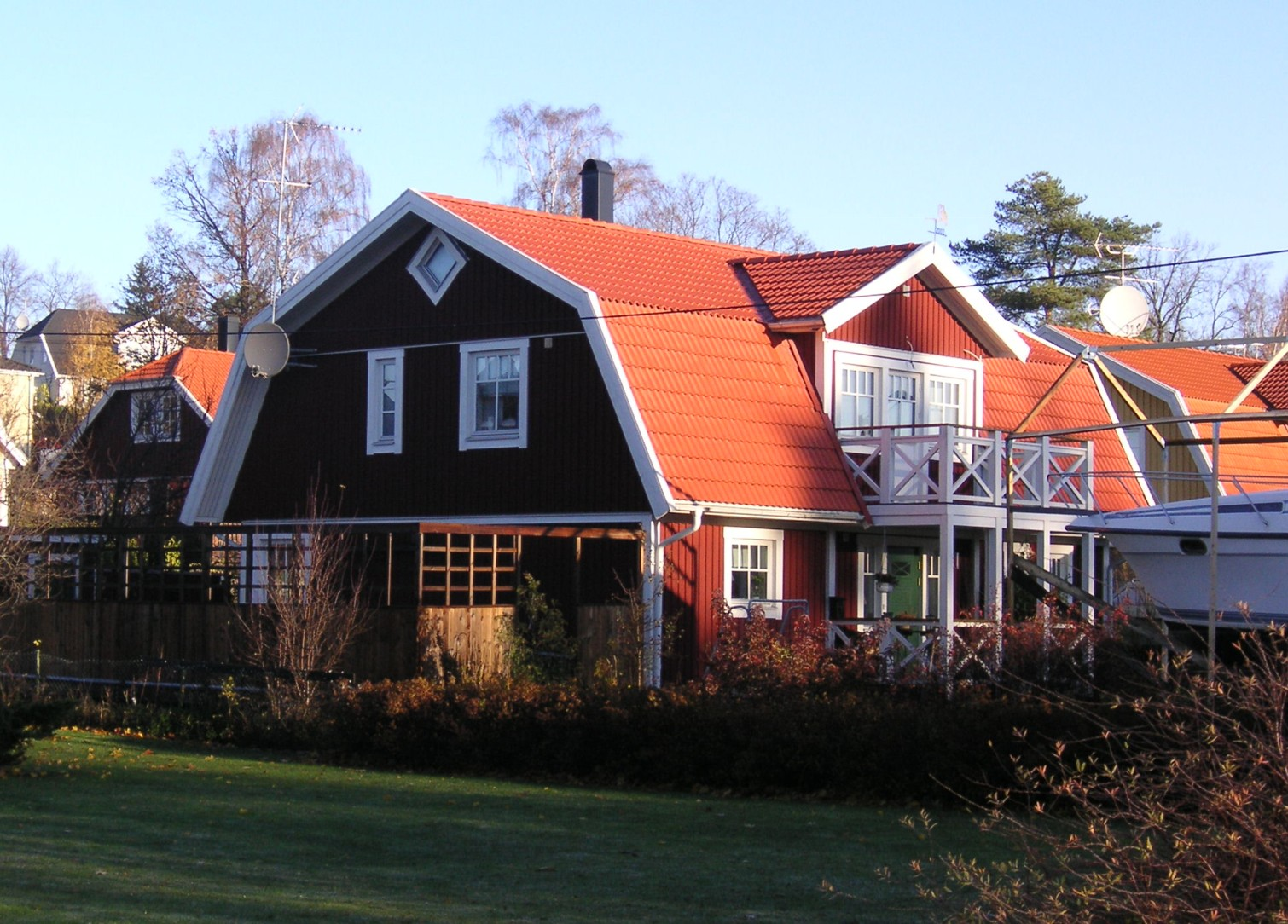 Brutet sadeltak